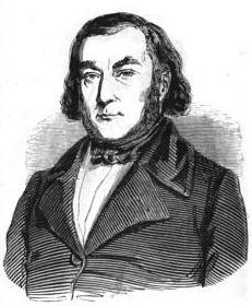 "Bethmont, ministre du commerce".